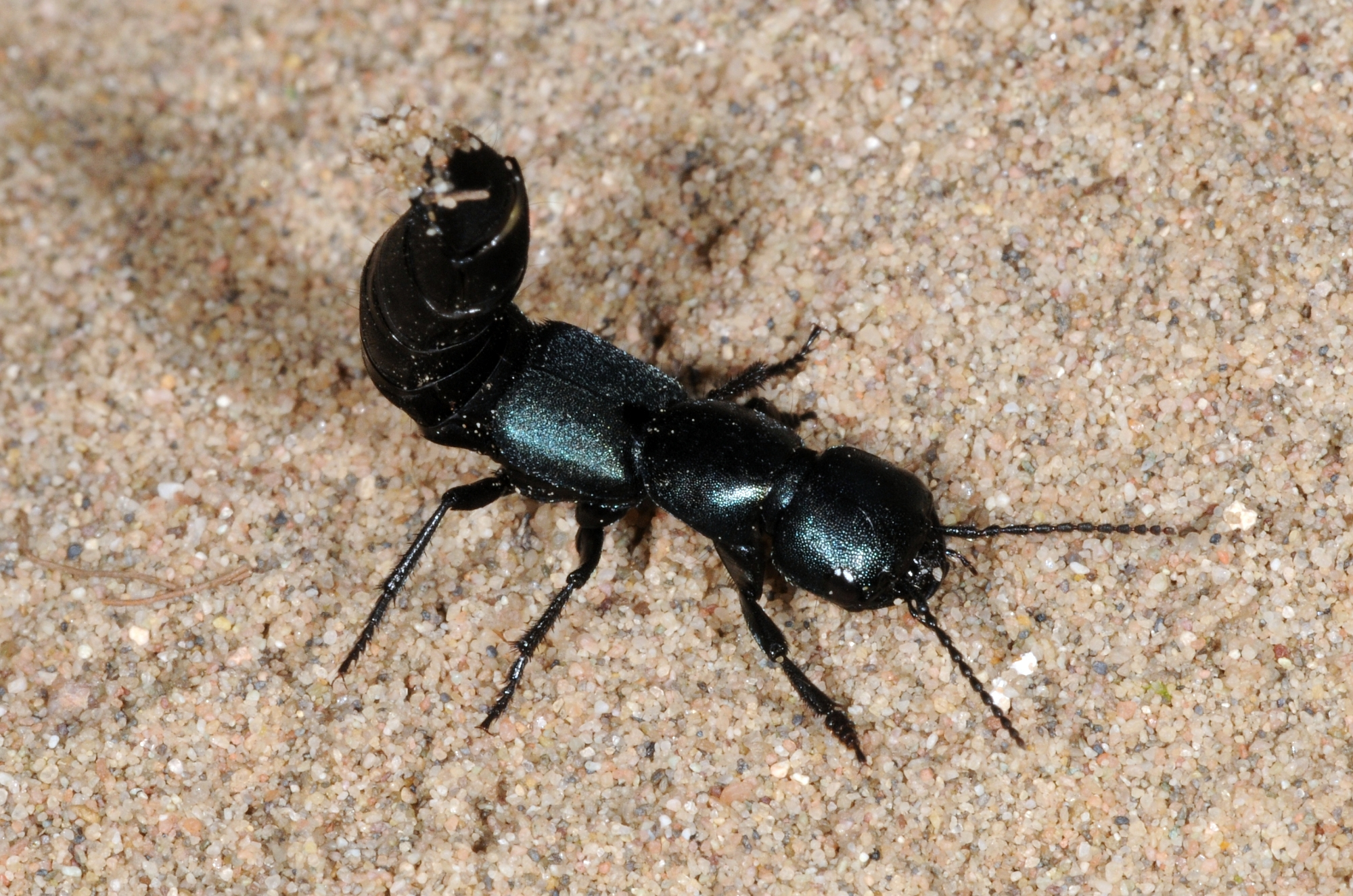 Ocypus ophthalmicus det. Frank Köhler (2011), Mainzer Sand, Rheinland-Pfalz, Deutschland